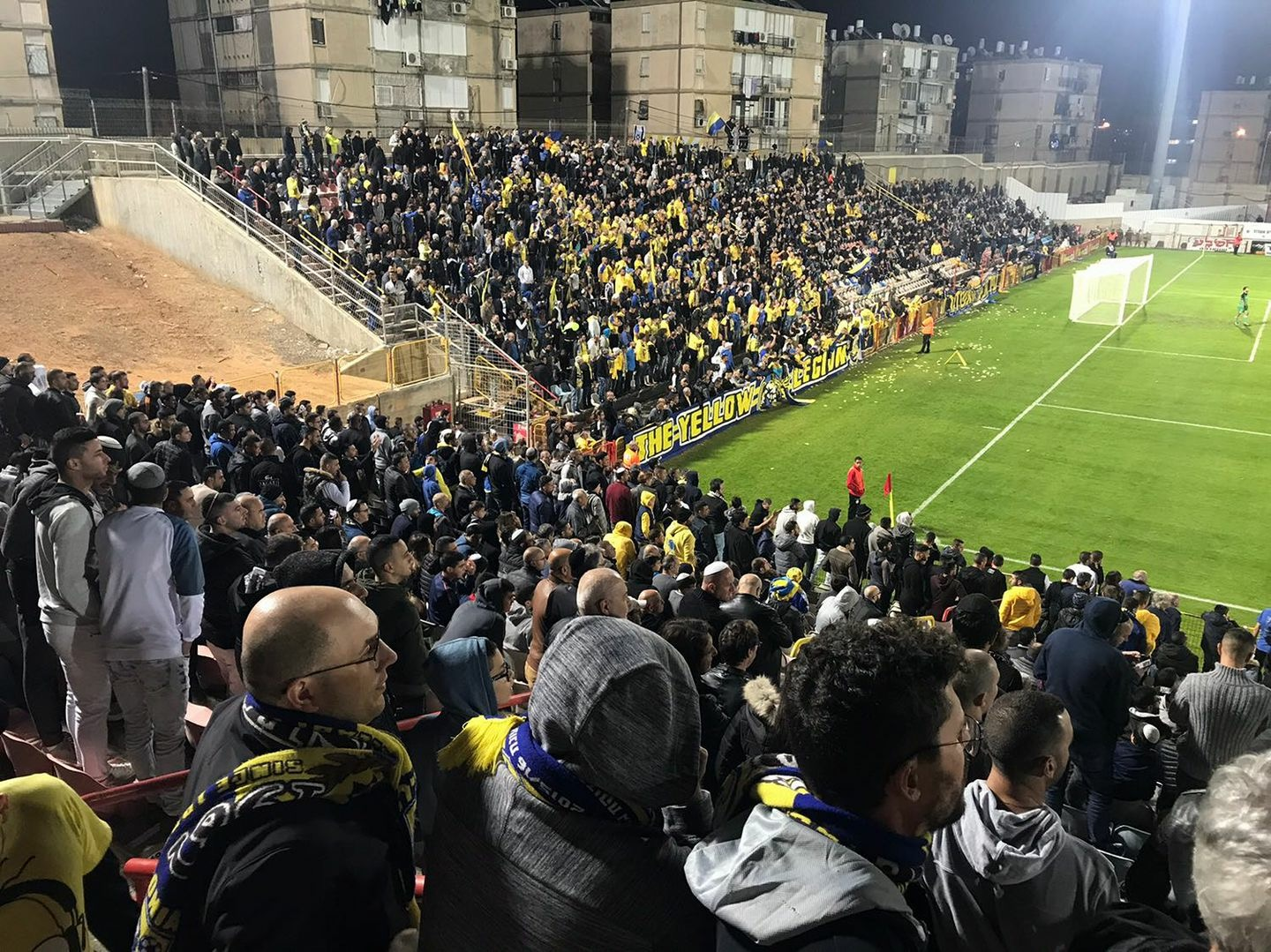 30-12-2017 קהל בדרבי של אשדוד